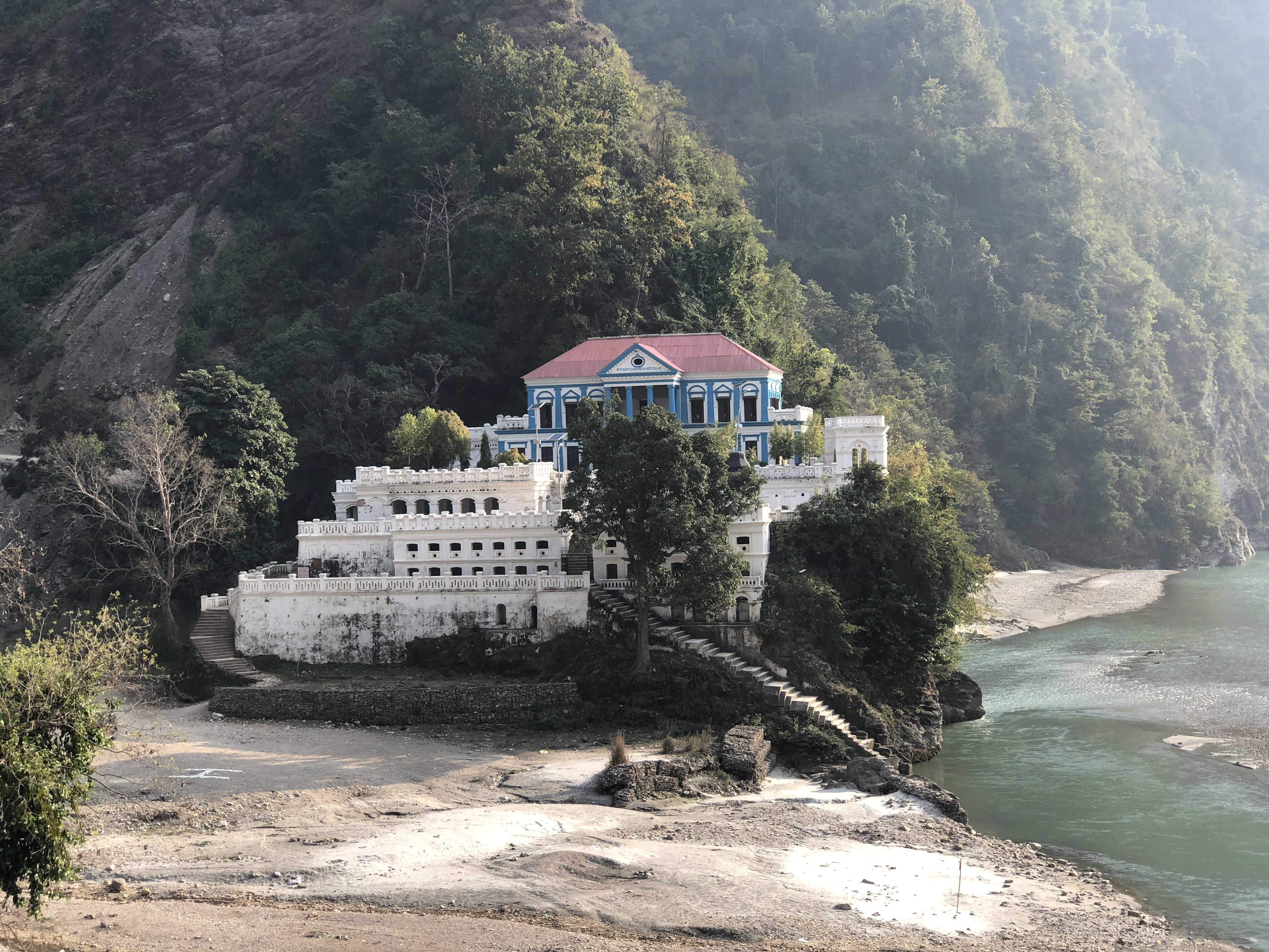 नेपाली: पाल्पामा अवस्थित रानिमहल